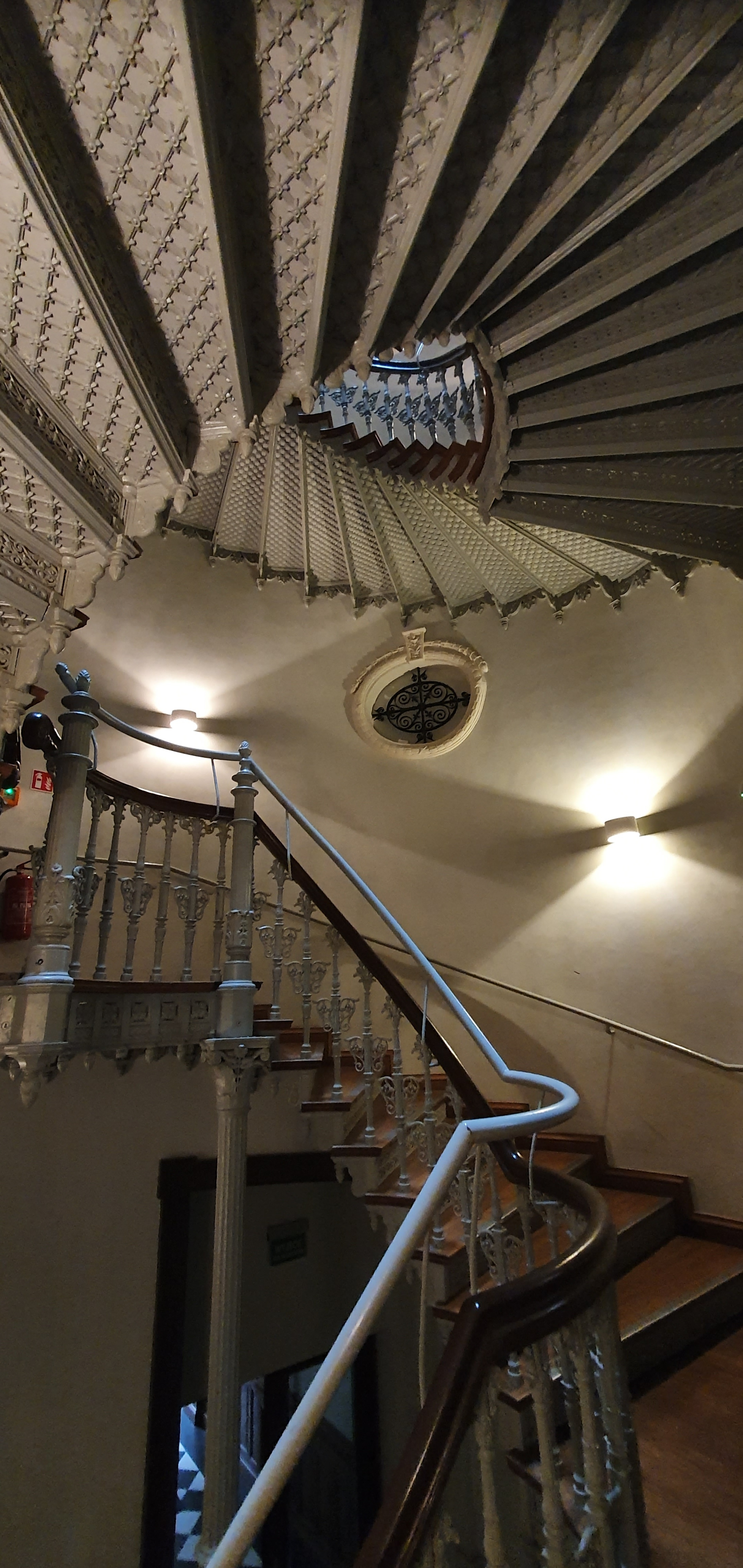 Klatka schodowa w Kamienica Sachsów we Wrocławiu